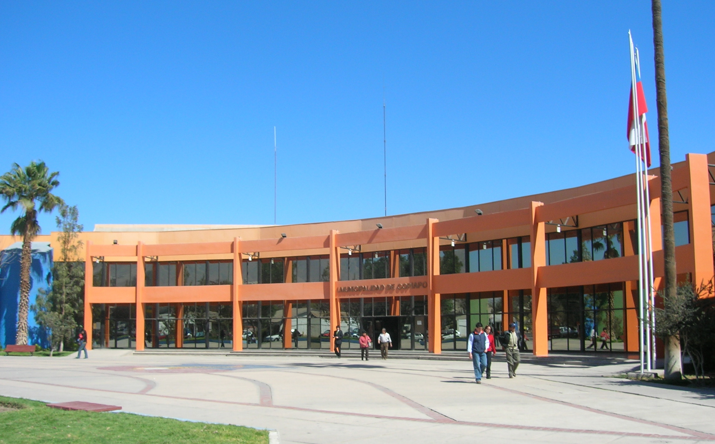 Municipalidad de Copiapó